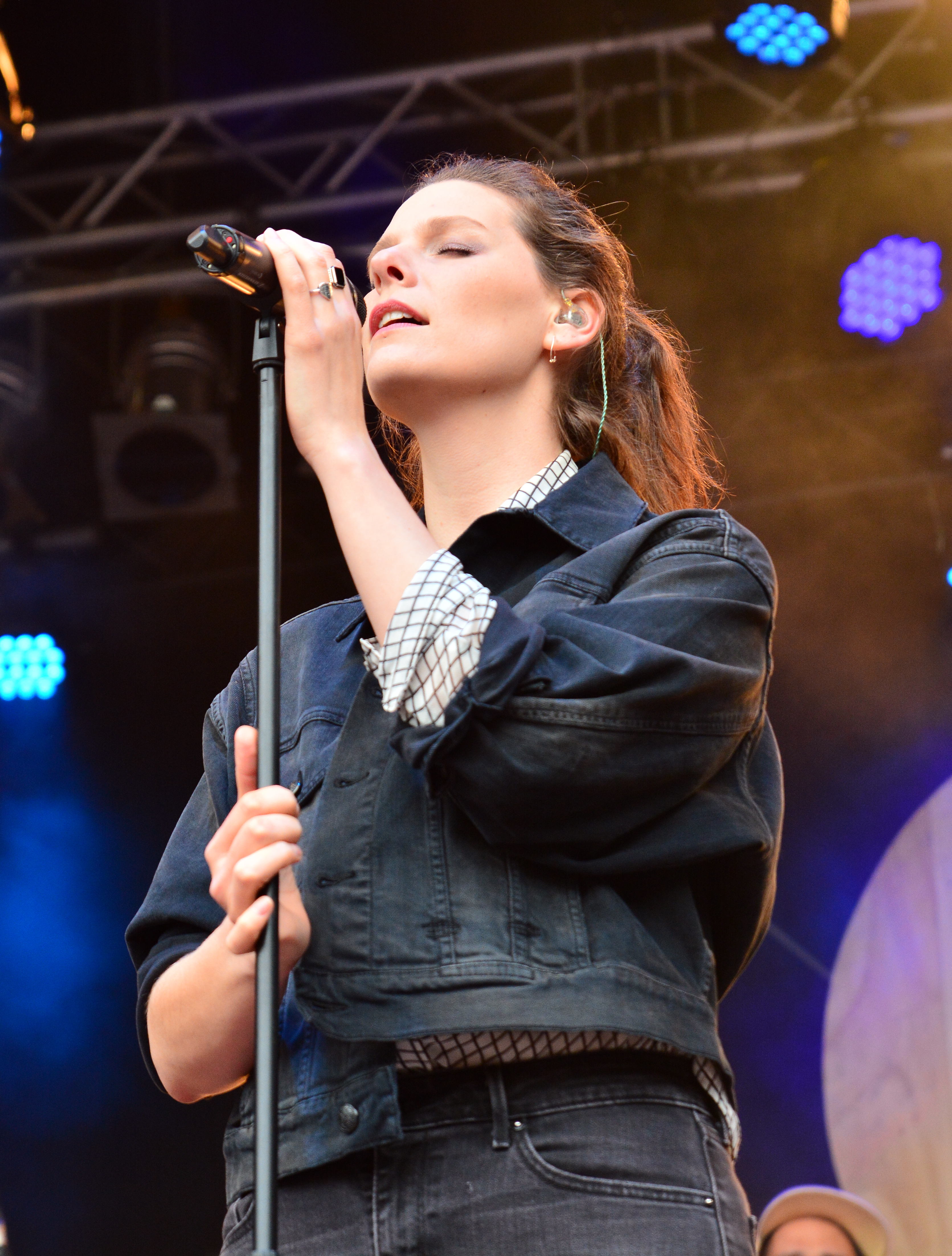 Eva Briegel von Juli beim „Holsten Brauereifest 2015“ in Hamburg